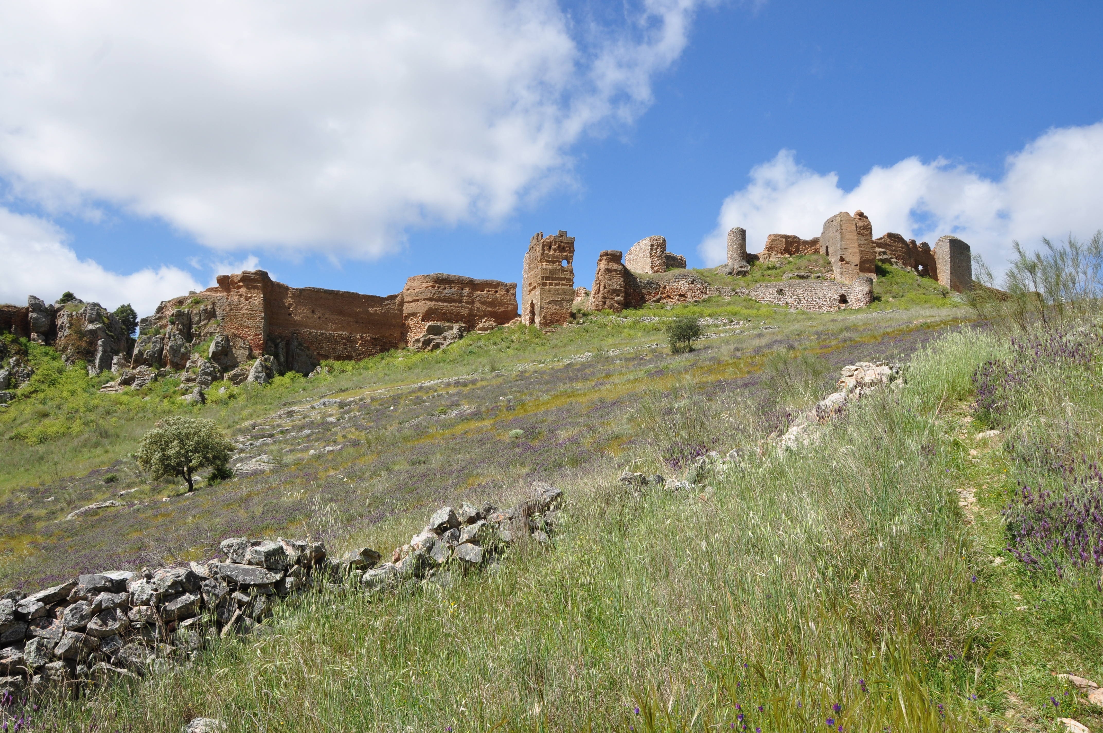 Sierra Grande de Hornachos This is a photography of a Special Area of Conservation in Spain with the ID: ES0000072. Natura2000 entry, EEA entry